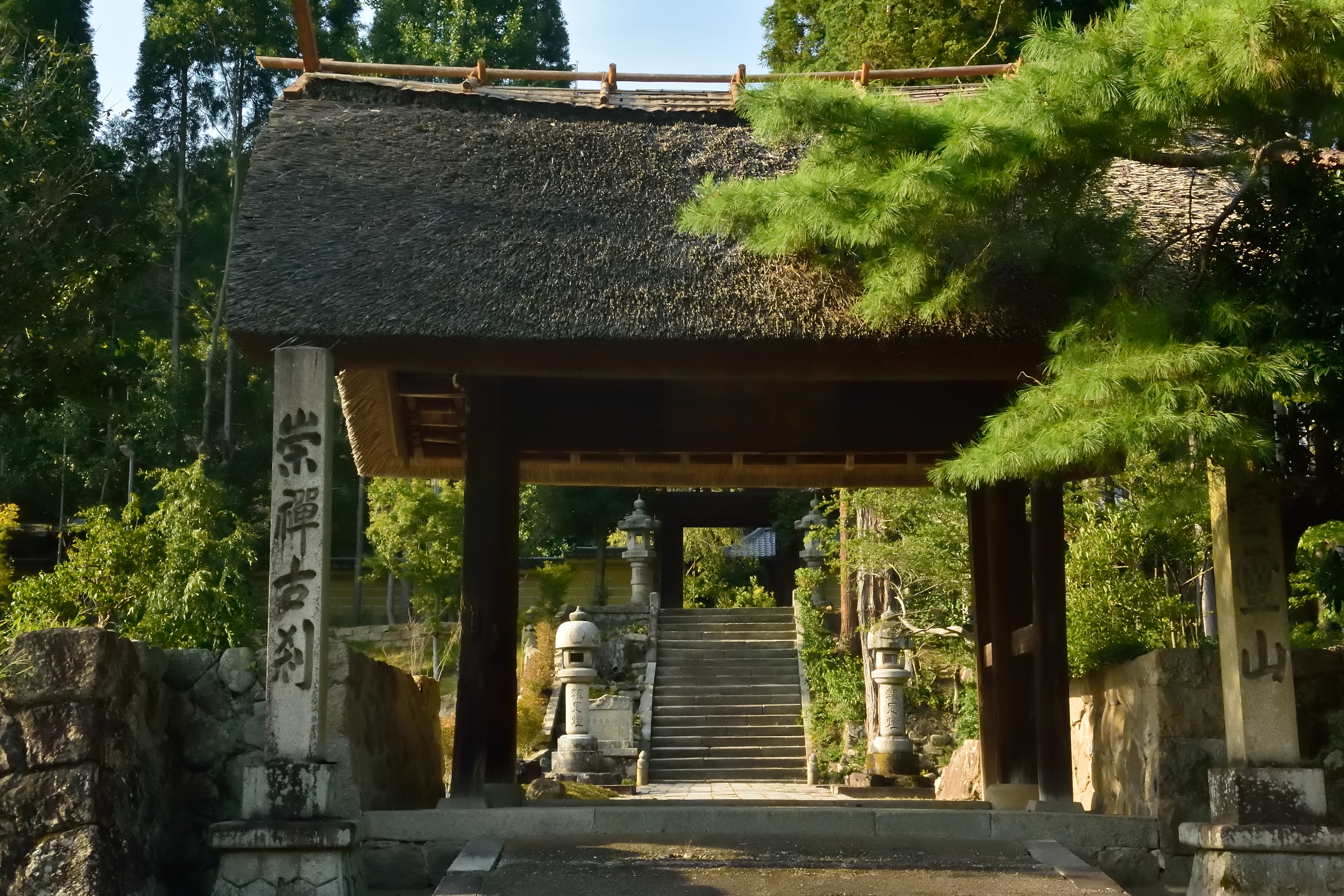 崇禅寺山門